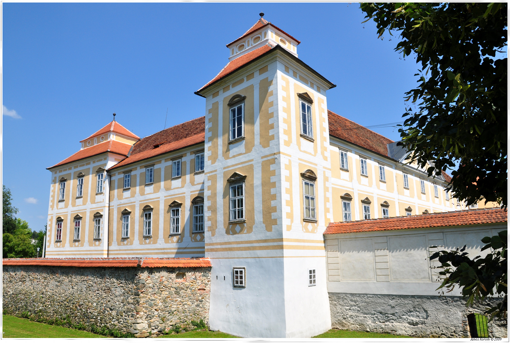 Das Schloss Windischfeistritz